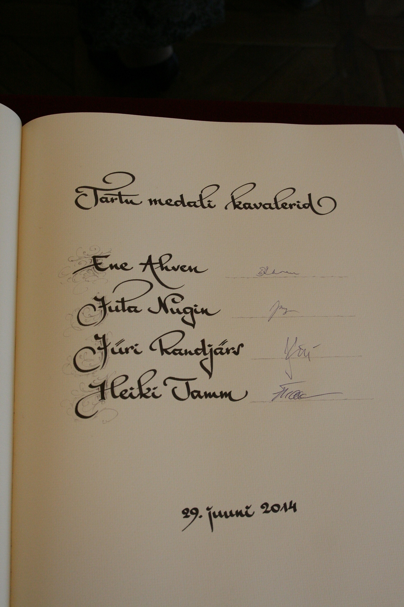 Tartu medali saajad 29. juunist 2014 linna auraamatus